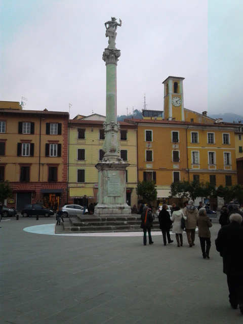 Colonna di Mercurio nell'omonima piazza, Massa